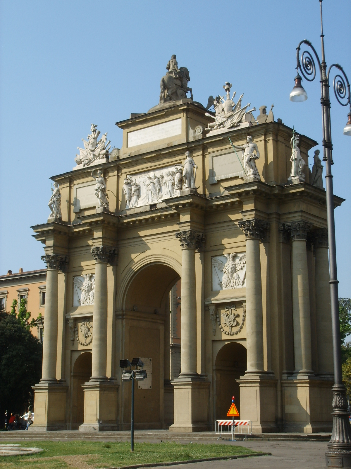 Arco piazza libertà 5